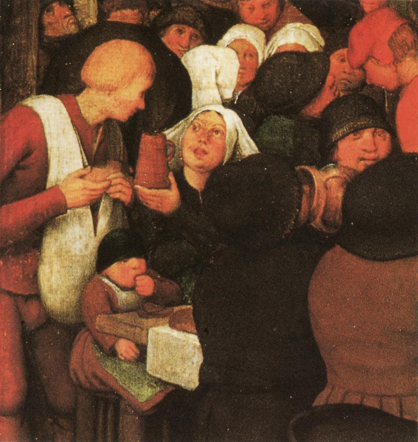 Ausschnitt aus Bruegels Gemälde: Die Bauernhochzeit